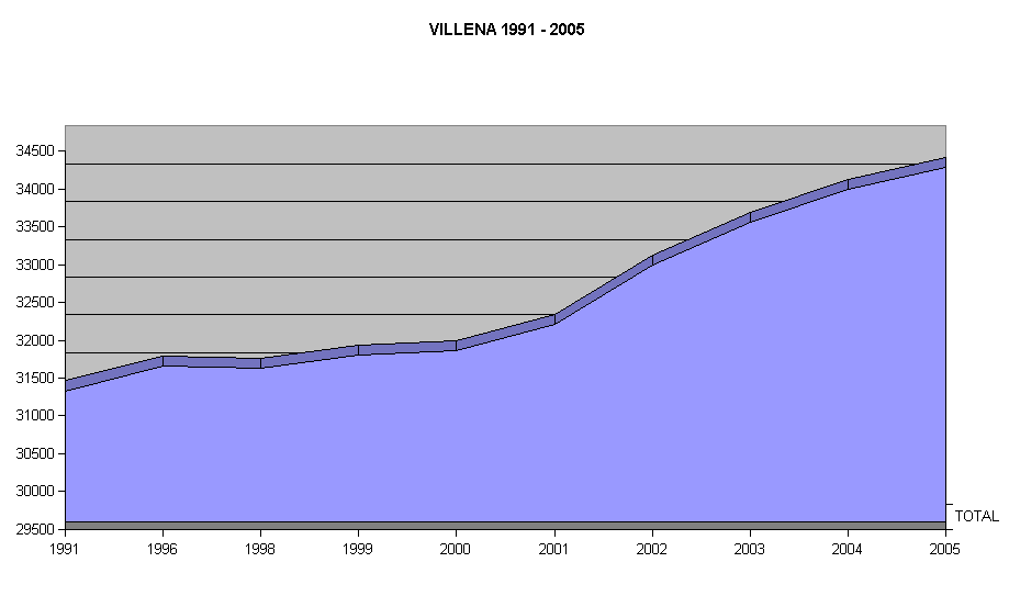 Licencia